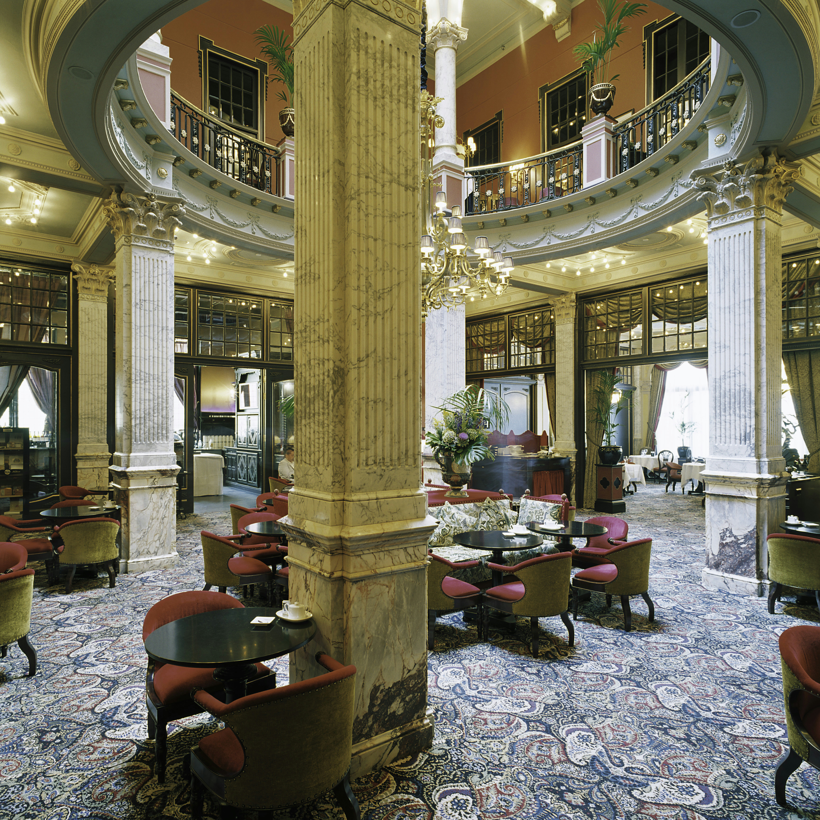 Hotel des Indes: Interieur, overzicht van het restaurant op de begane grond